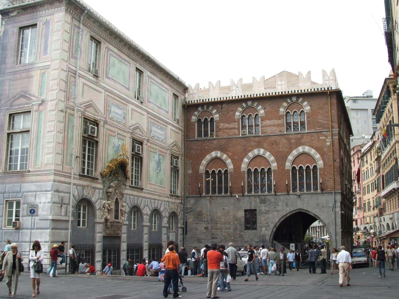 Palazzo San Giorgio (Genova), lato nord e Loggia dei Banchi